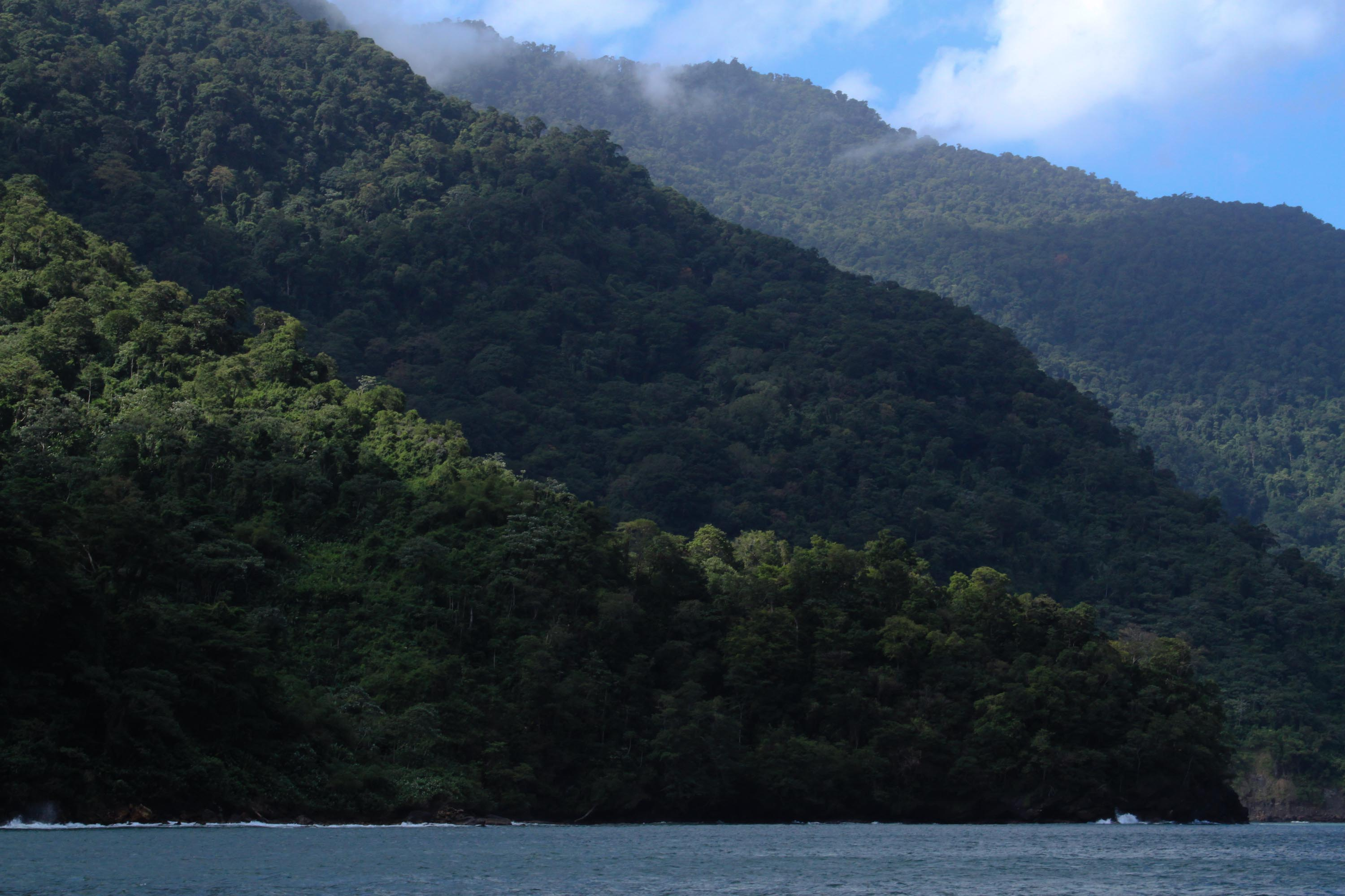 Montañas y costas